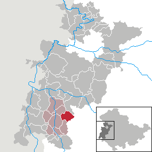 Urnshausen in Thuringia - Wartburgkreis